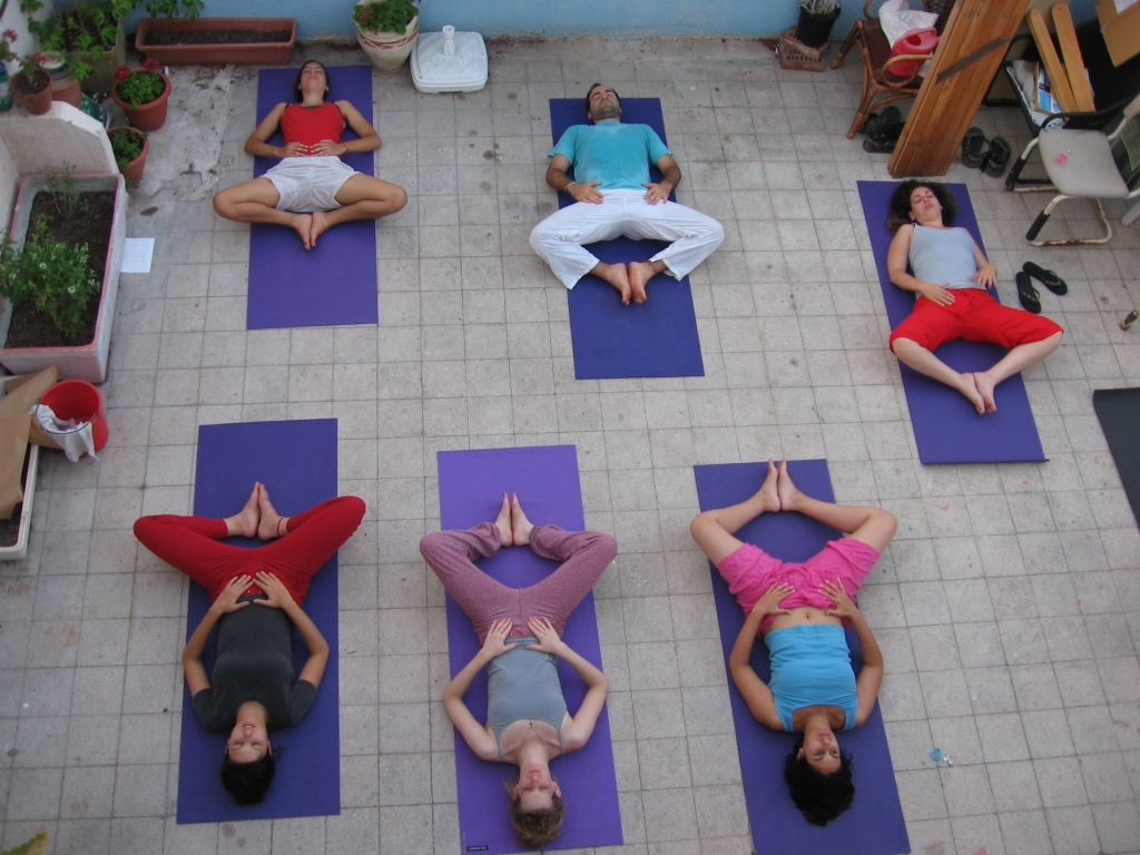 A yoga class doing Supta Baddha Konasana (Reclining Cobbler's Pose)